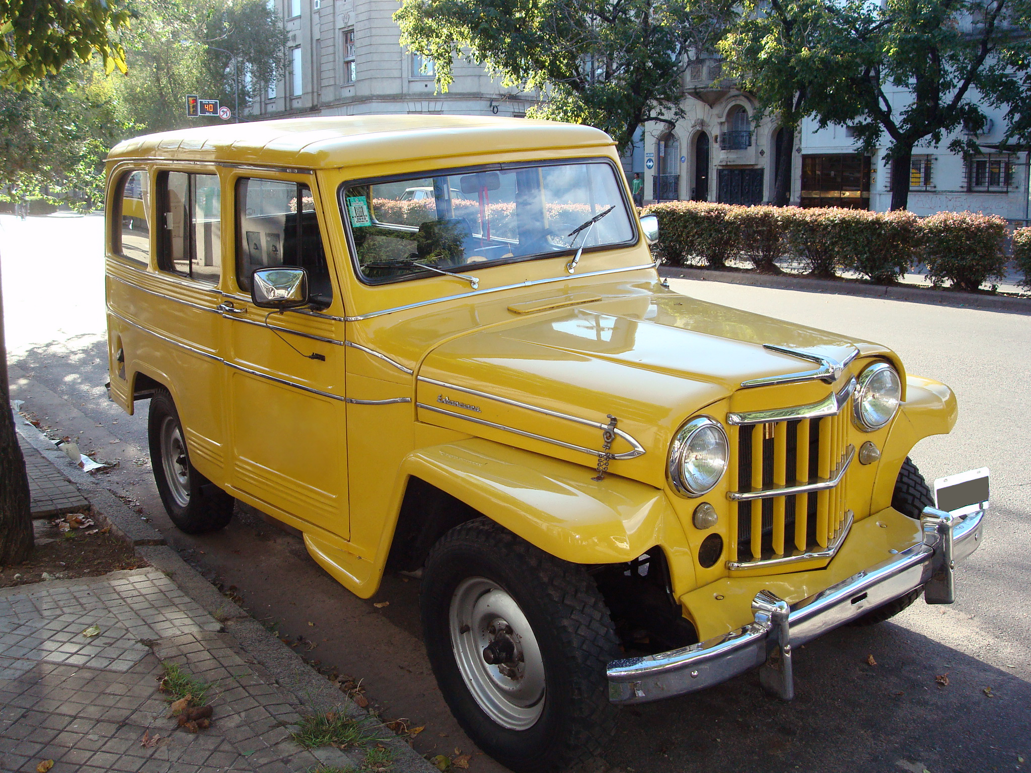 Estanciera Argentina, marca IKA Industrias Kaiser Argentina en Rosario (Santa Fe).